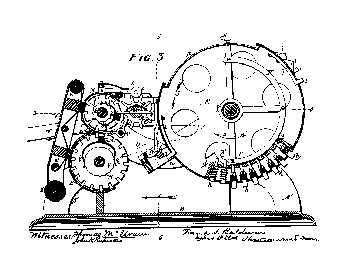 Querschnittszeichnung einer Baldwin-Sprossenradmaschine.